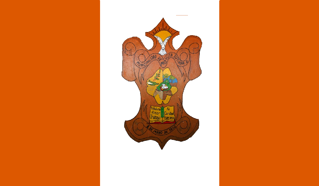 Bandera Oficial del Municipio de Moyuta, Jutiapa.